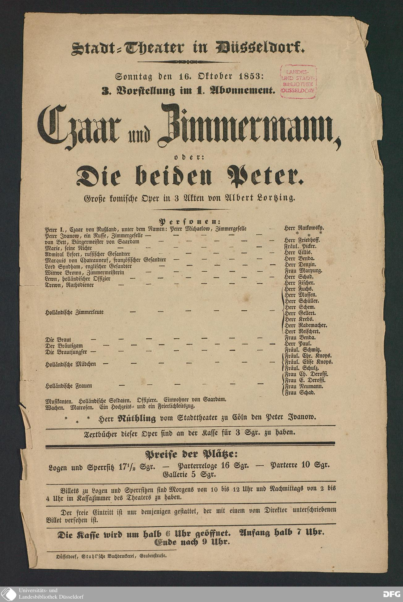 Theaterzettel Stadt-Theater Düsseldorf, Czaar und Zimmermann 1853